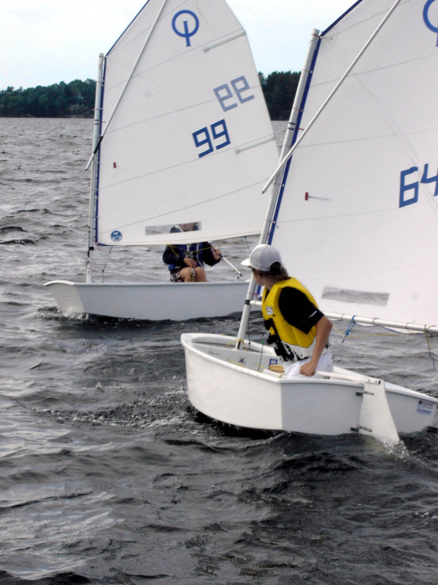 Optimisten bei der MLA Sailing Regatta 2005